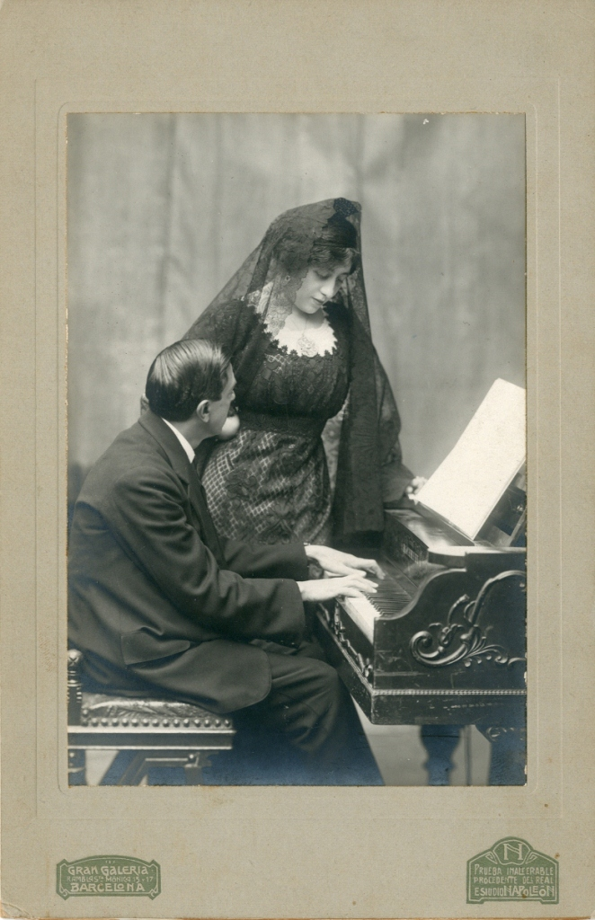 Imatge feta als estudis dels Napoleón, al fons d'arxiu del Museu de la Música de Barcelona, número de registre 02.2138